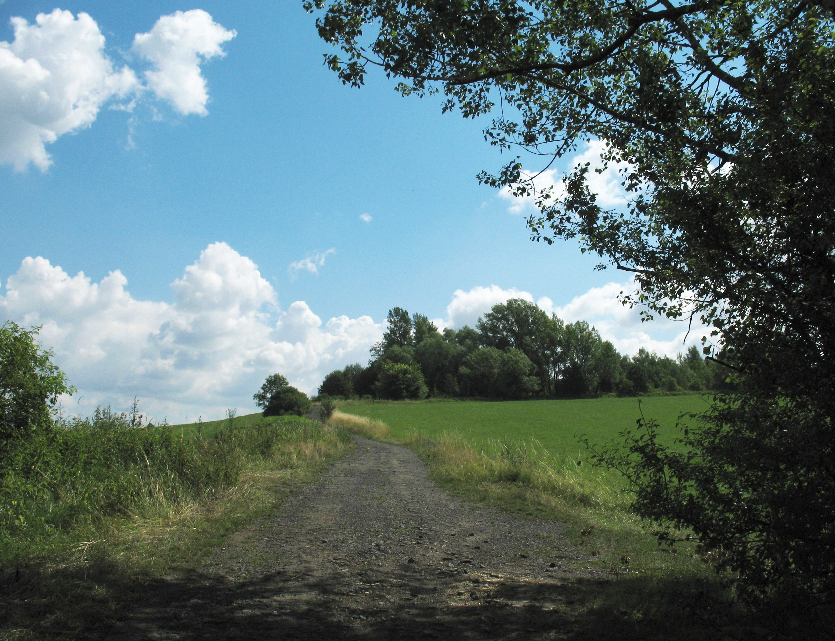 Cesta na Hončovu hůrku